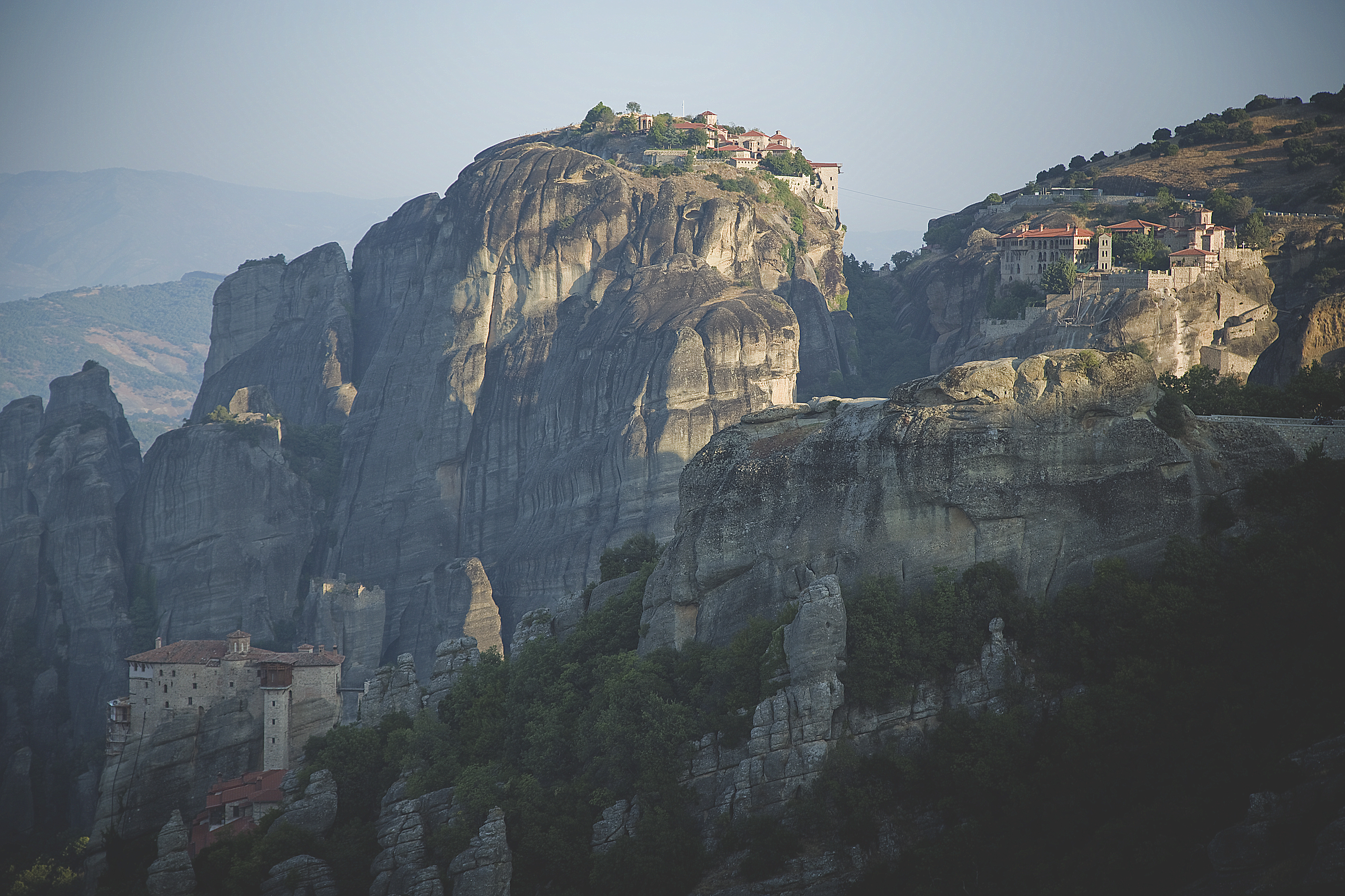 A view of Meteora and the monestaries.